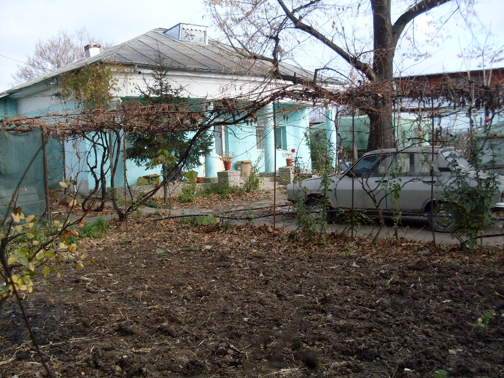 Casa Elena Chicoș